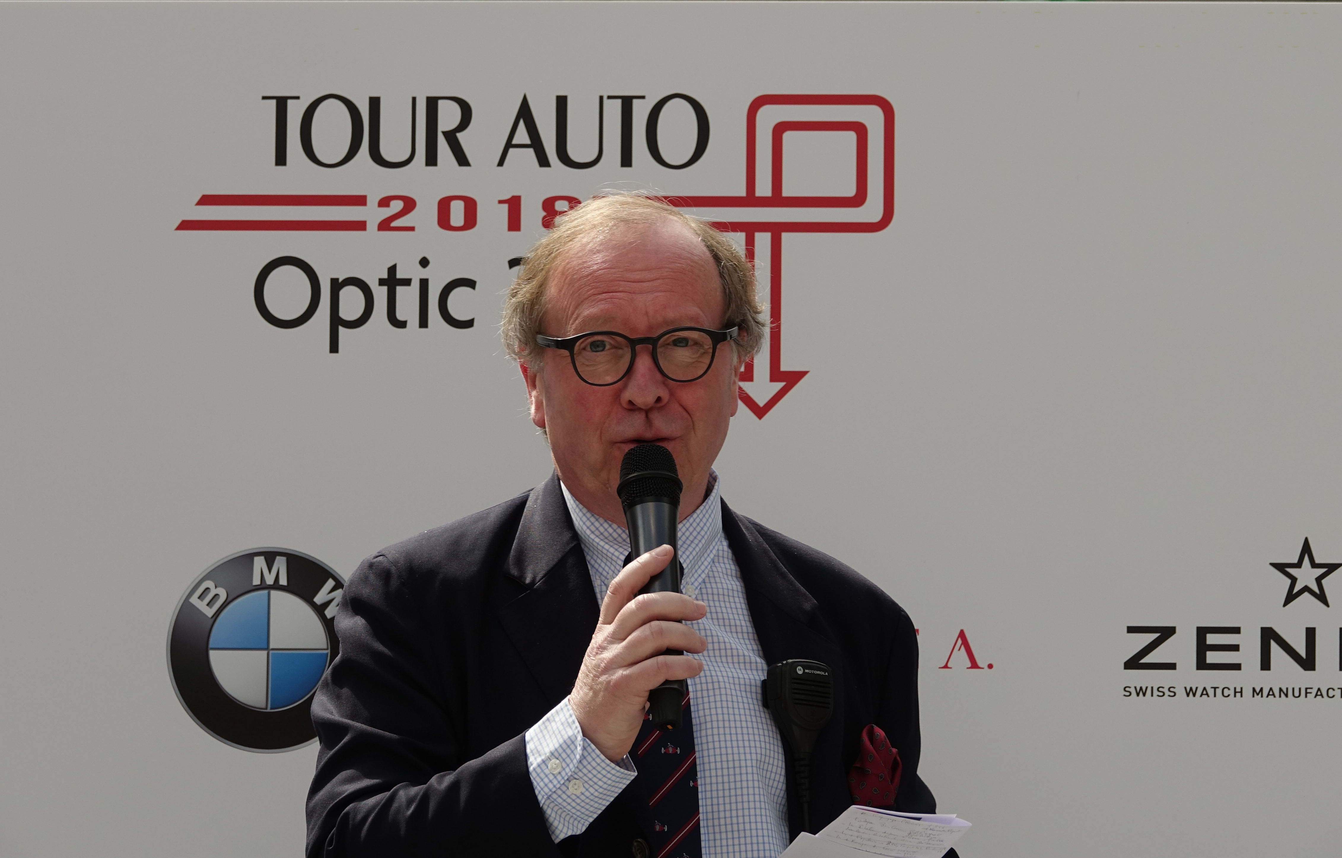 Tour Auto Optic 2000 (2018)